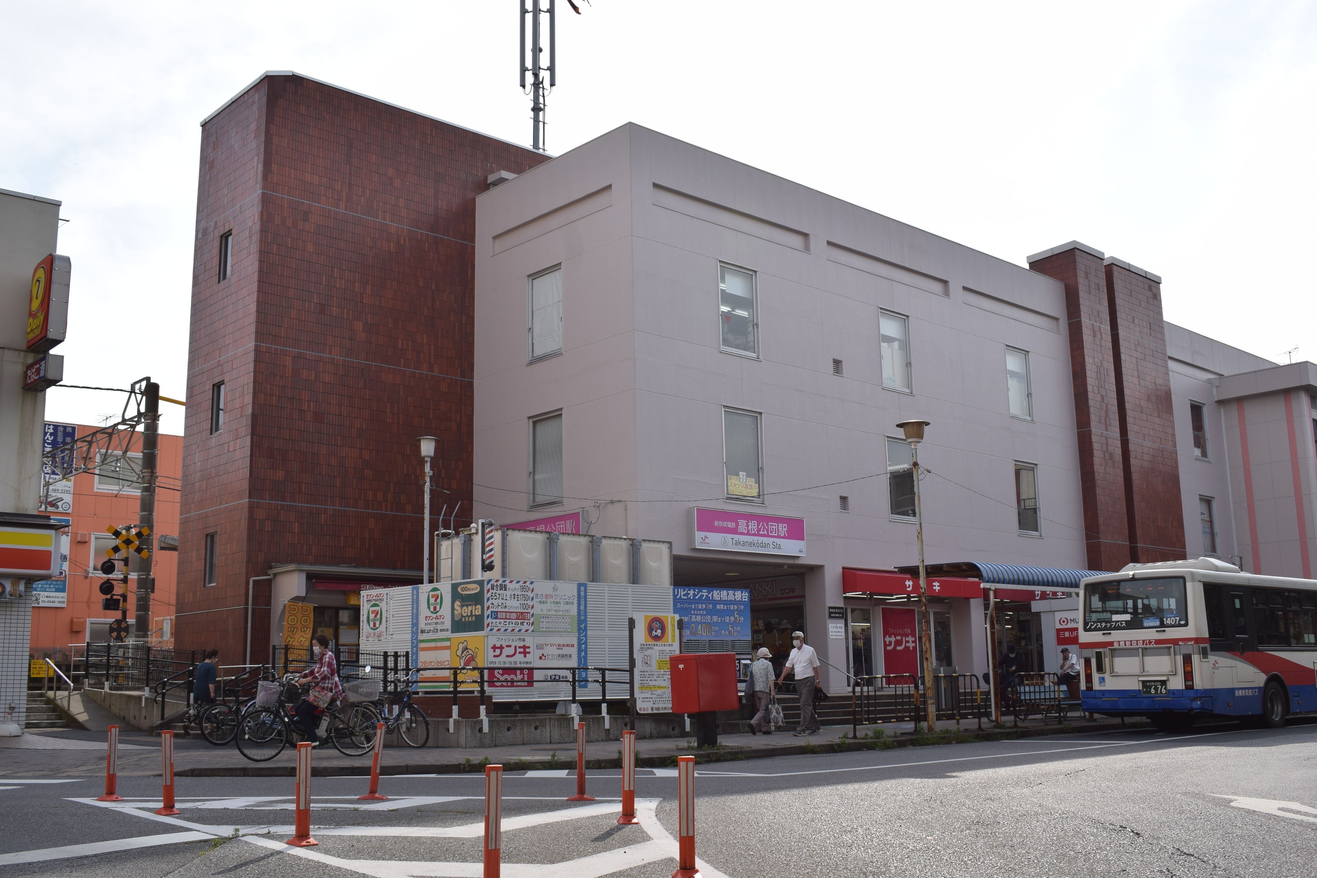 高根公団駅北口